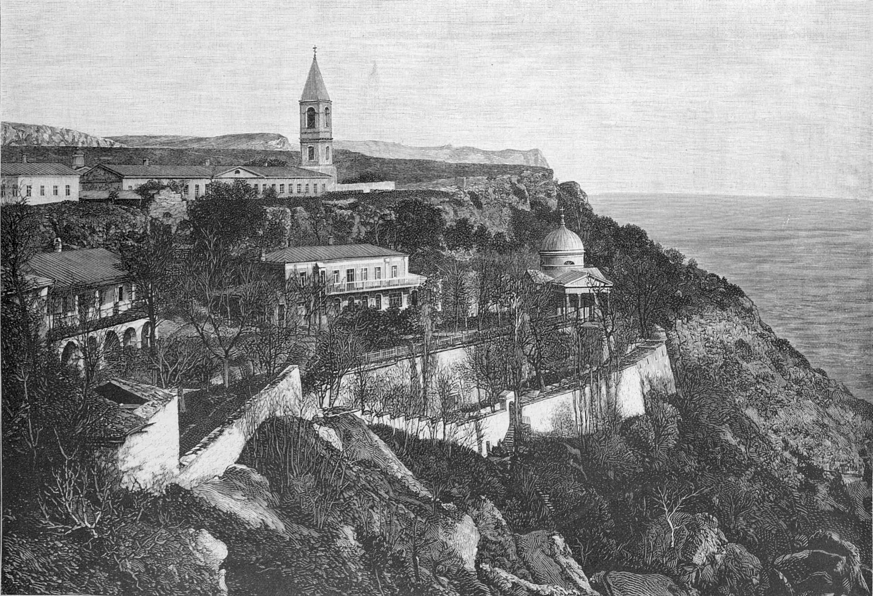 Балаклавский Свято-Георгиевский монастырь, 1891 год